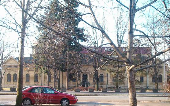 Zgrada koja je za potrebe Pasterog zavoda izgrađena 1900.g u Nišu